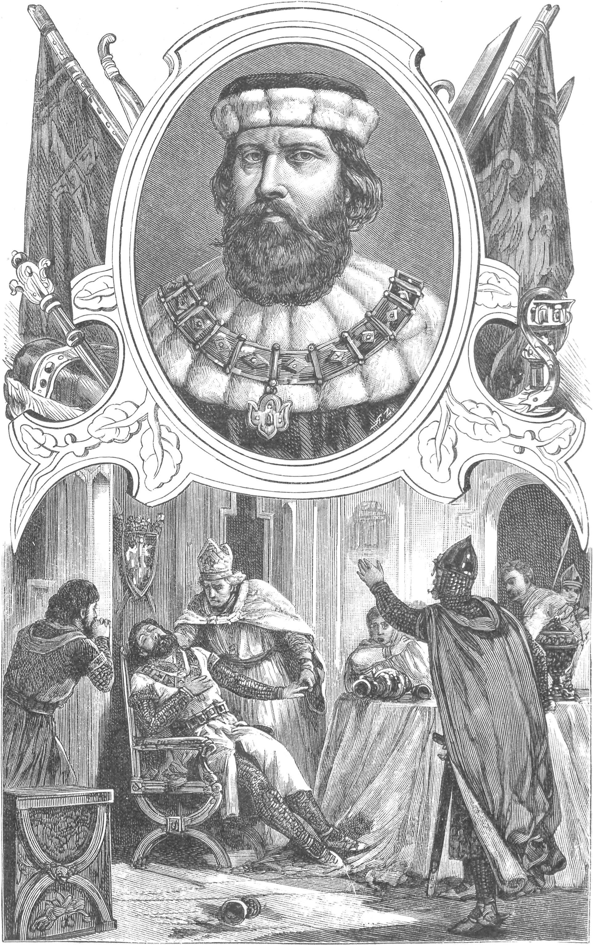 ilustracja z książki „Wizerunki książąt i królów polskich“